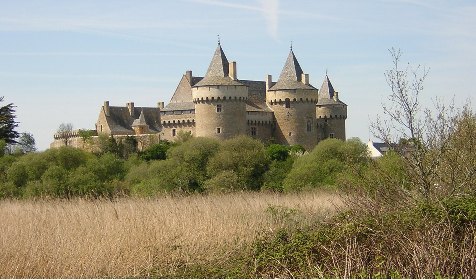 Château de Suscinio. Morbihan (56) France.